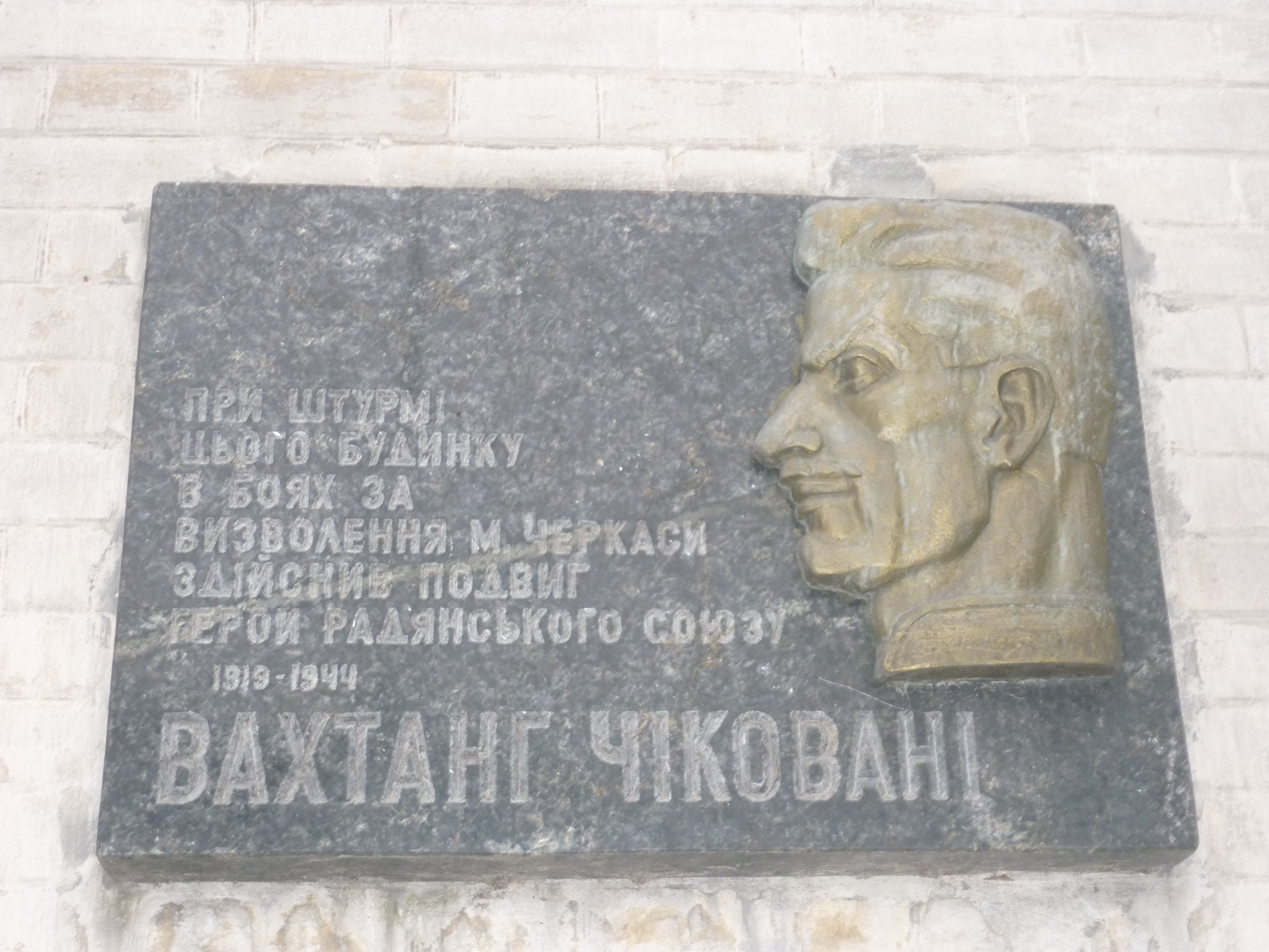 Пам'ятна табличка Герою Радянського Союзу Вахтангу Чіковані на будинку, де він загинув (Черкаси)